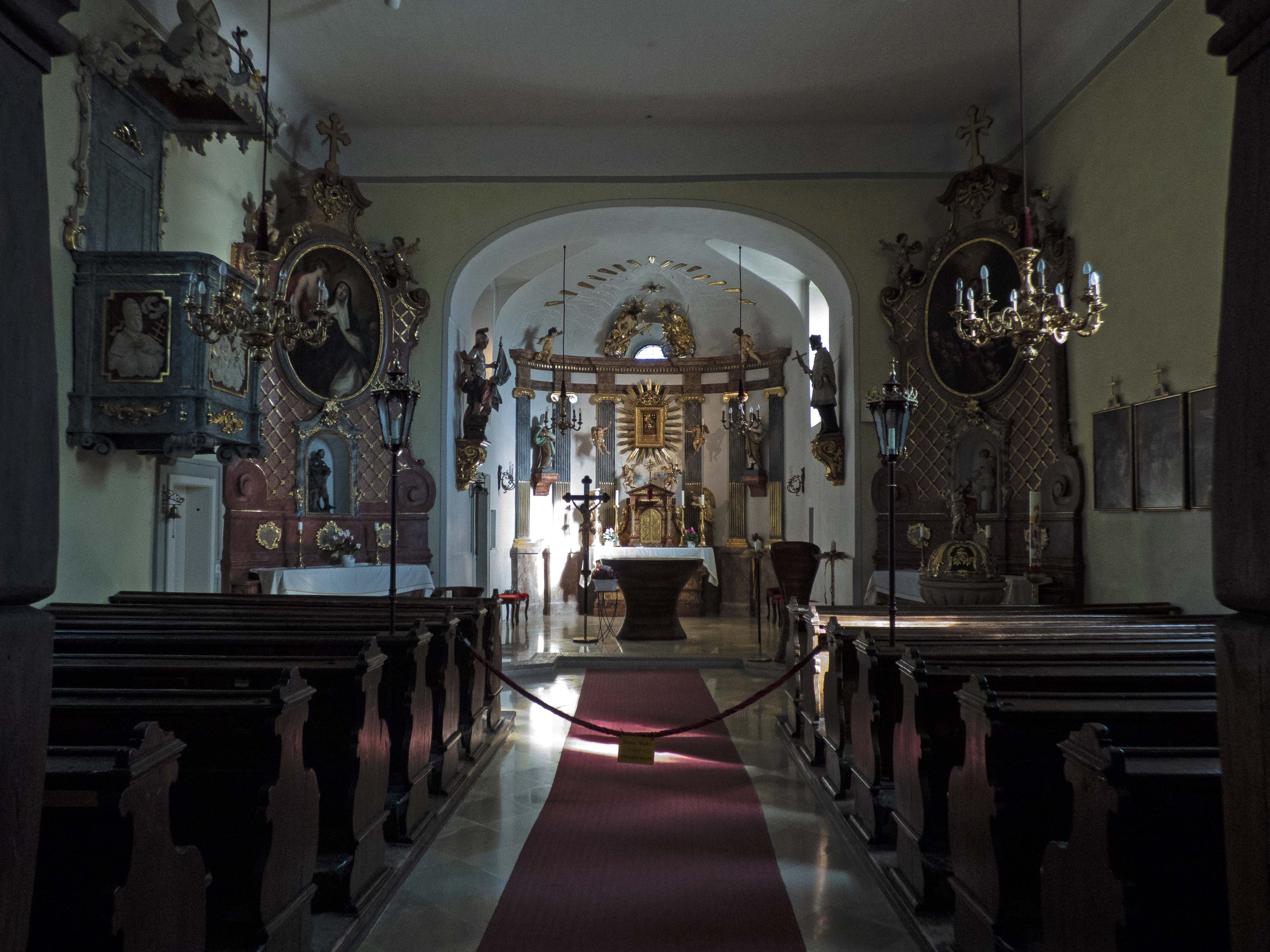 Die katholische Kirche Maria Namen befindet sich am Kirchenplatz 2 in Sulz im Wienerwald.